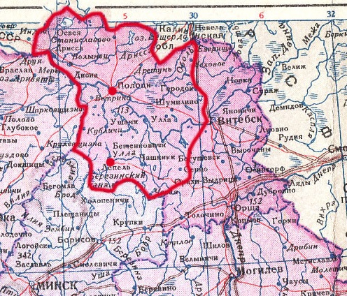 Зона ответственности 201-й охранной дивизии (третий рейх) в Белоруссии 1942-1944гг. (изображение создано на основе файла Belorussian SSR 1940.jpg )